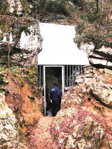 Fotografía tomada en 2004